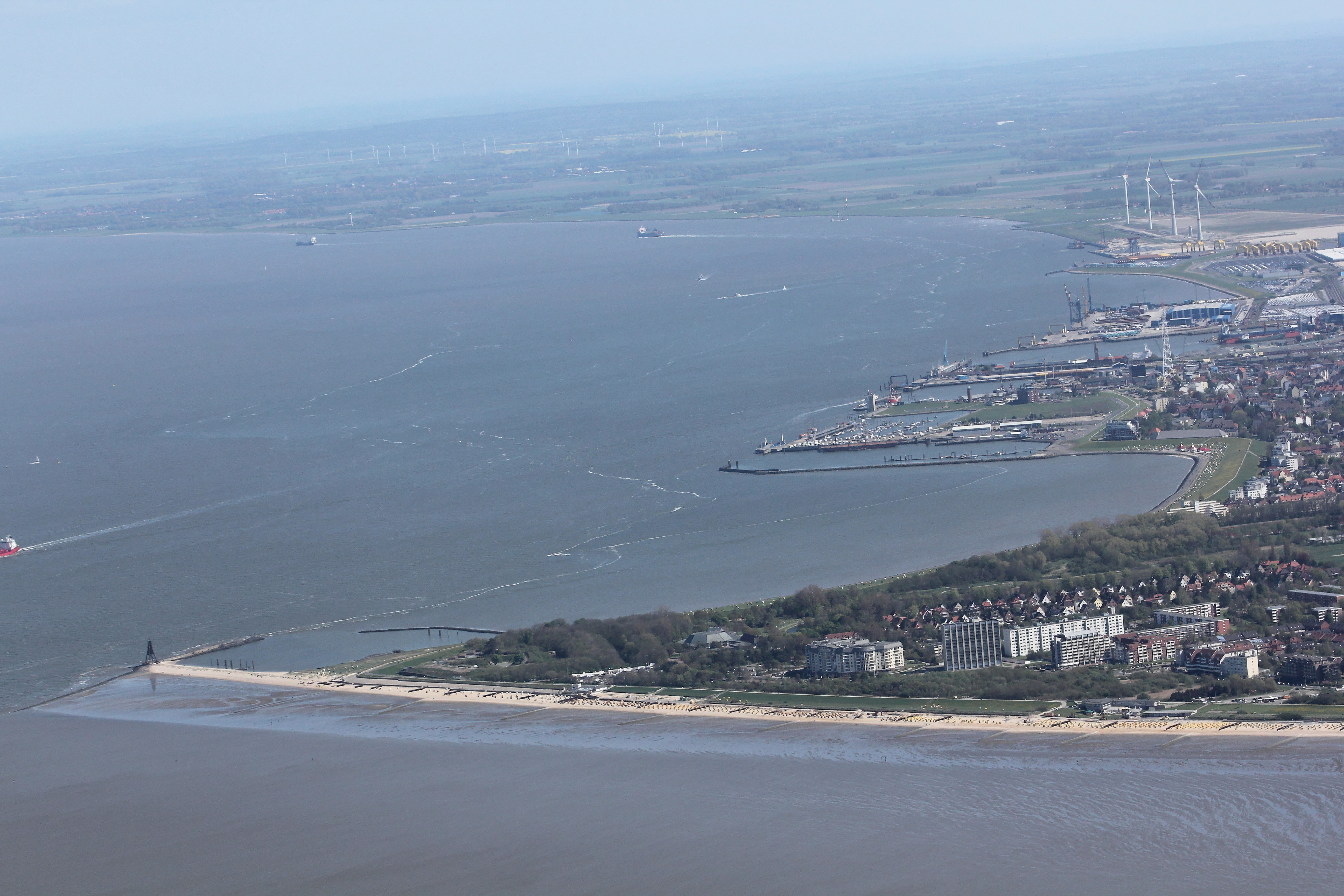 Luftaufnahme: die Elbe vor Cuxhaven, in der Bildmitte die Grimmershörn-Bucht